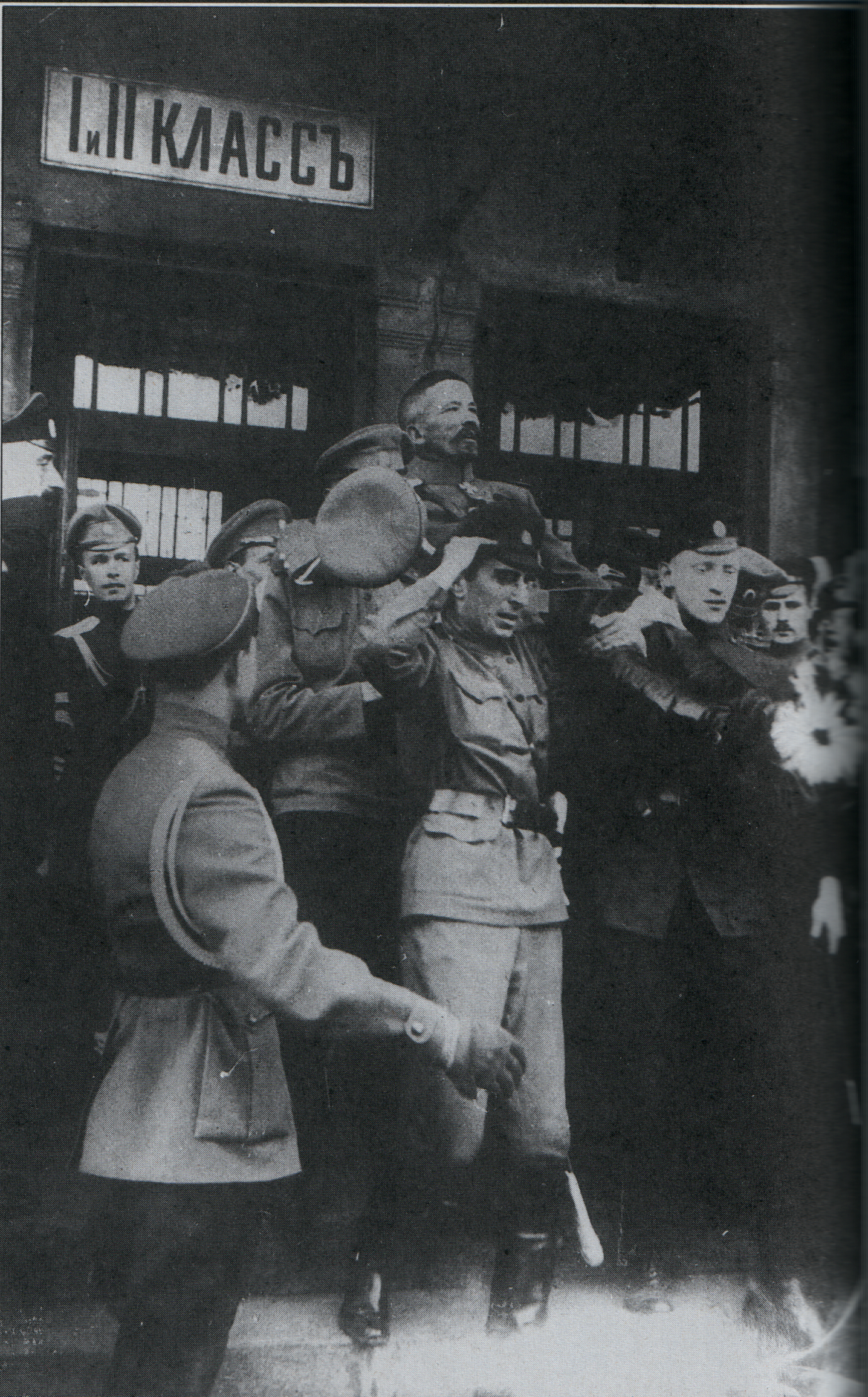 Triunfal recepción de la Unión de Oficiales al general Lavr Kornilov a su llegada a Moscú para participar en la Conferencia Estatal, 25 de agosto de 1917 (12 de agosto del calendario juliano).